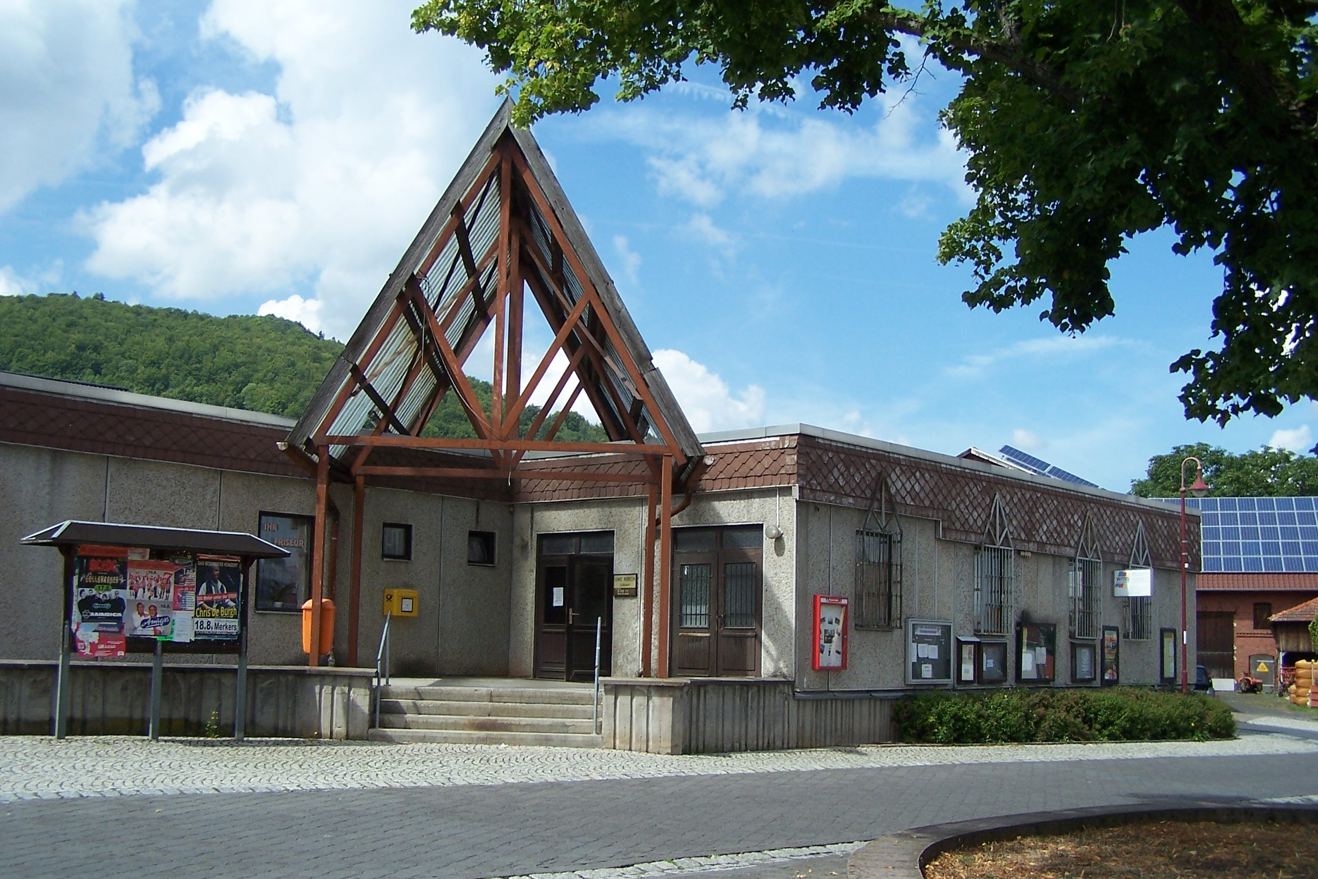 Ansichten, Details und Bauwerke im Ort.